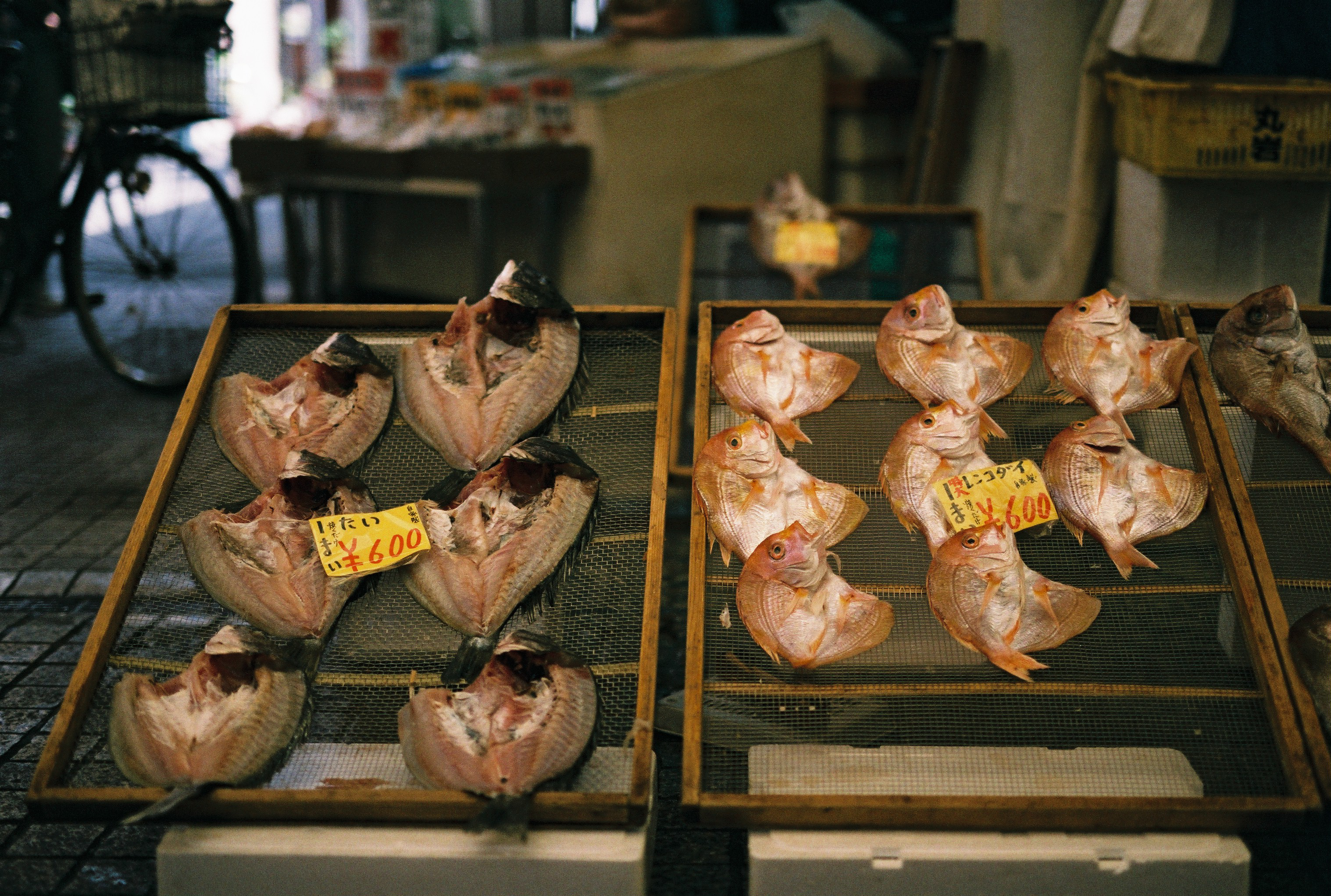 ひらき (Hiraki) ひらき (Hiraki: opened and dried fish) of 鯛 (tai: sea bream). SA-9 with 50/1.4a Fujicolor Superia Premium 400